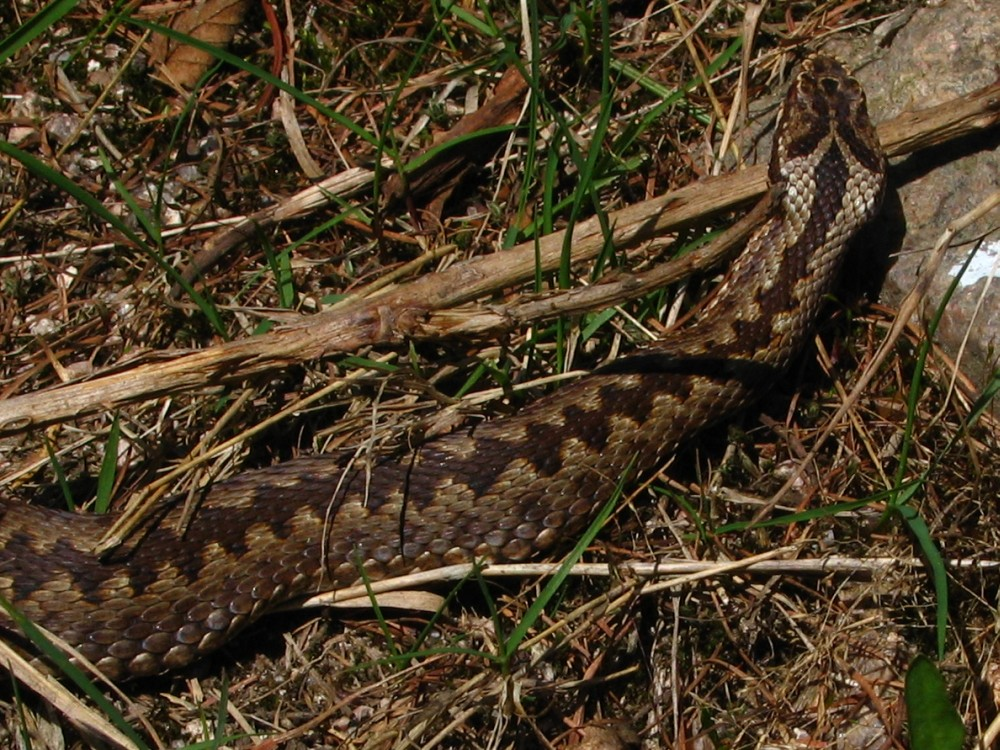 Żmija zygzakowata / Crossed Viper (Vipera berus). Place: Rudawy Janowickie, Poland. Author: PiterT.